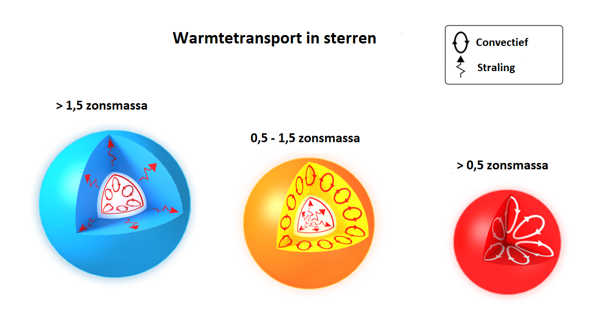 Klein-middelgroot-groot verschillend warmtetransport